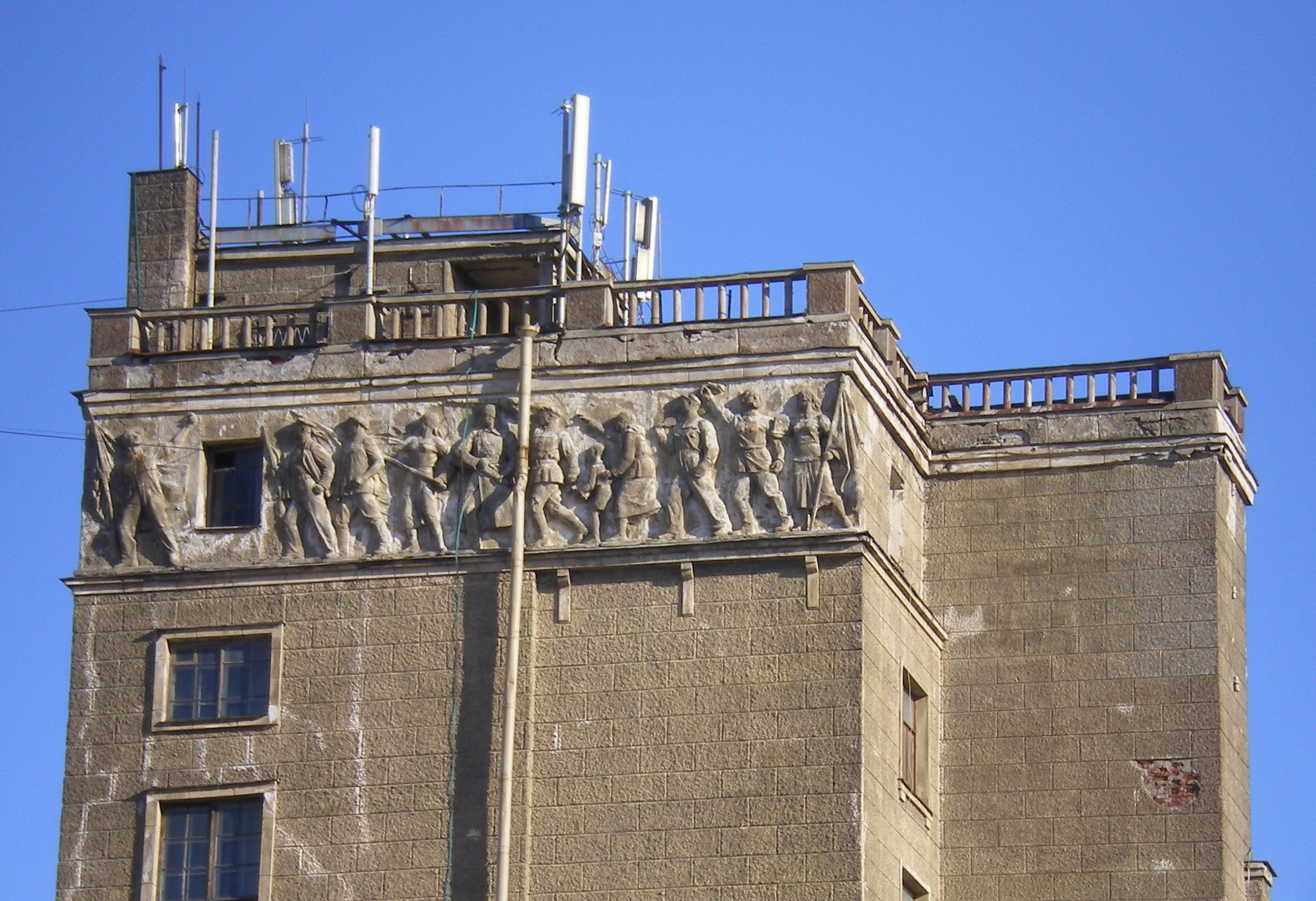 Здание бывшей реформаторской церкви. Рельефы под крышей